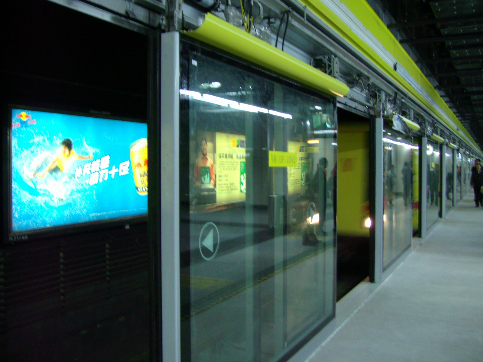 中文（中国大陆）: 一辆列车驶来。